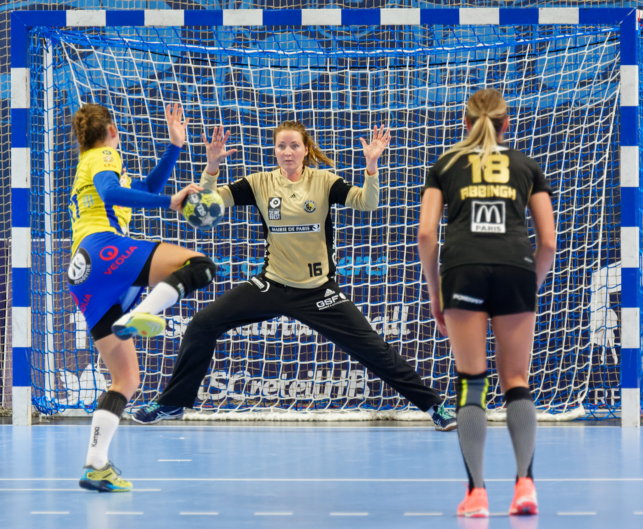 Camille Aoustin (Metz Handball) lors d'un jet de 7m face à Silje Solberg (Issy Paris Hand) pendant une rencontre de LFH entre Issy Paris Hand et Metz Handball. Lois Abbingh (n°18 d'Issy Paris) présente devant la ligne des 9 mètres à ne pas dépasser tant que le pénalty de l'adversaire n'a pas été déclenché. A Créteil, le 25 septembre 2016.